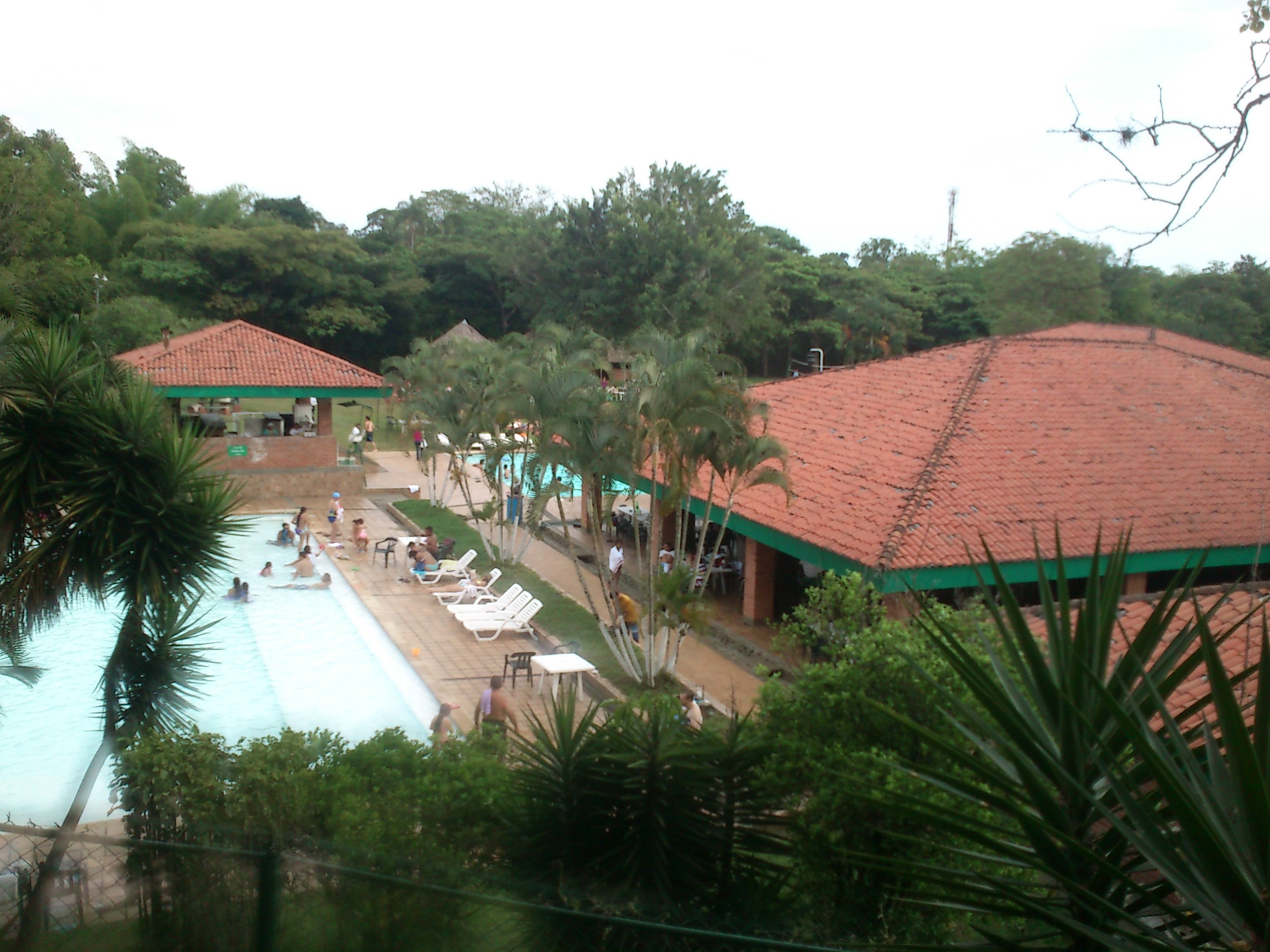 Kampara sidejo de la ĉiama gloria futbalteamo Deportivo Cali.